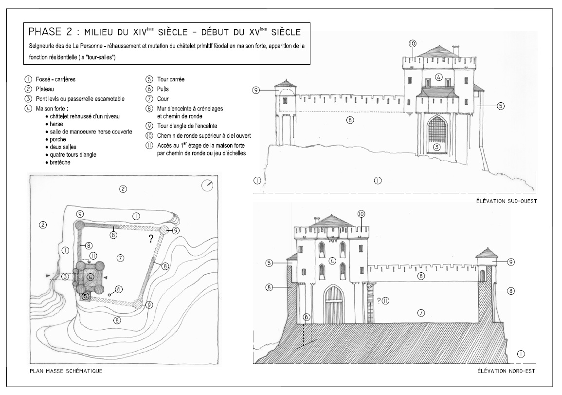 le châtelet de Pernant au milieu du XIV°